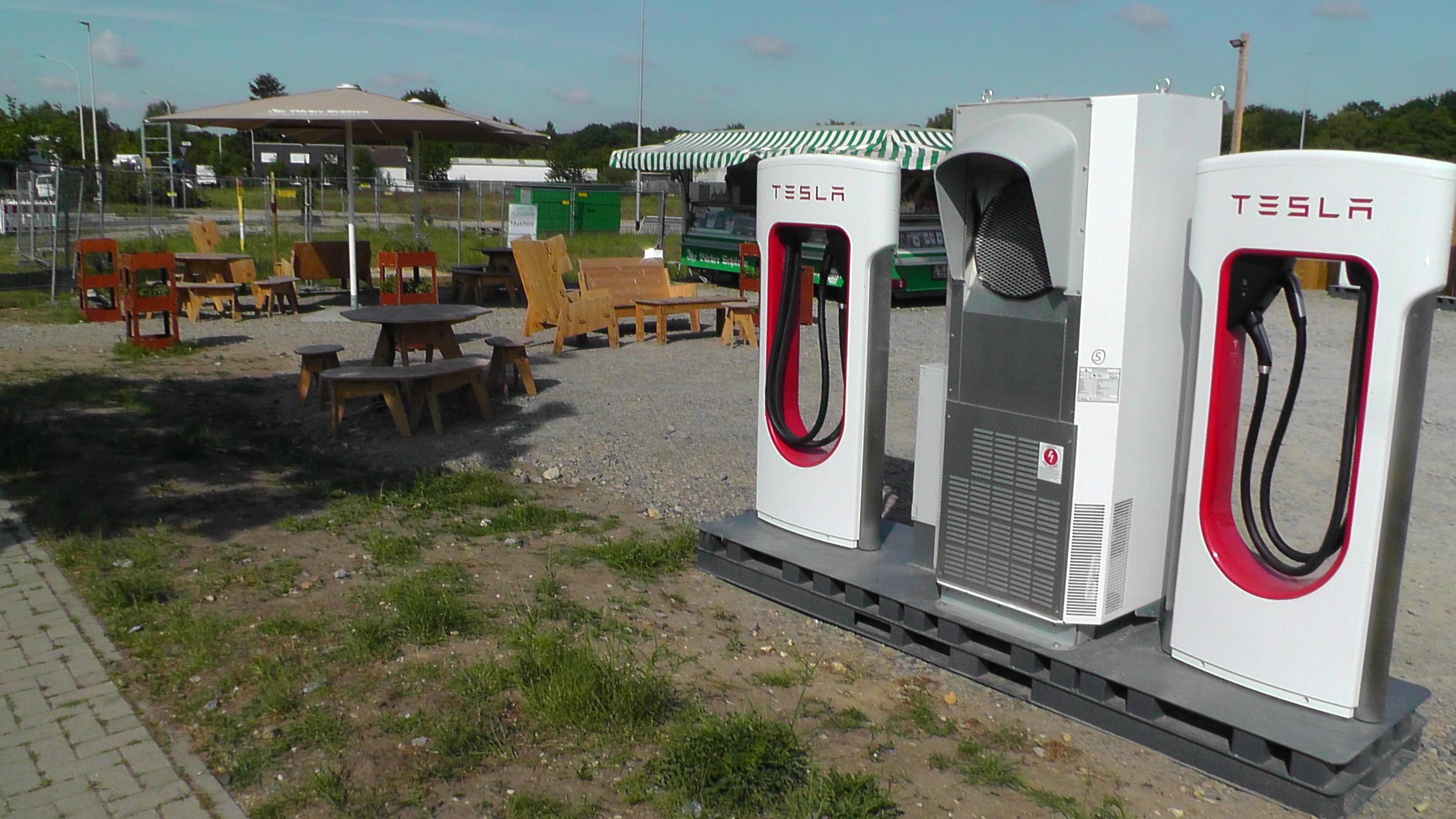 Hilden E-Auto-Ladepark Giesenheide, Roland Schüren, Tesla